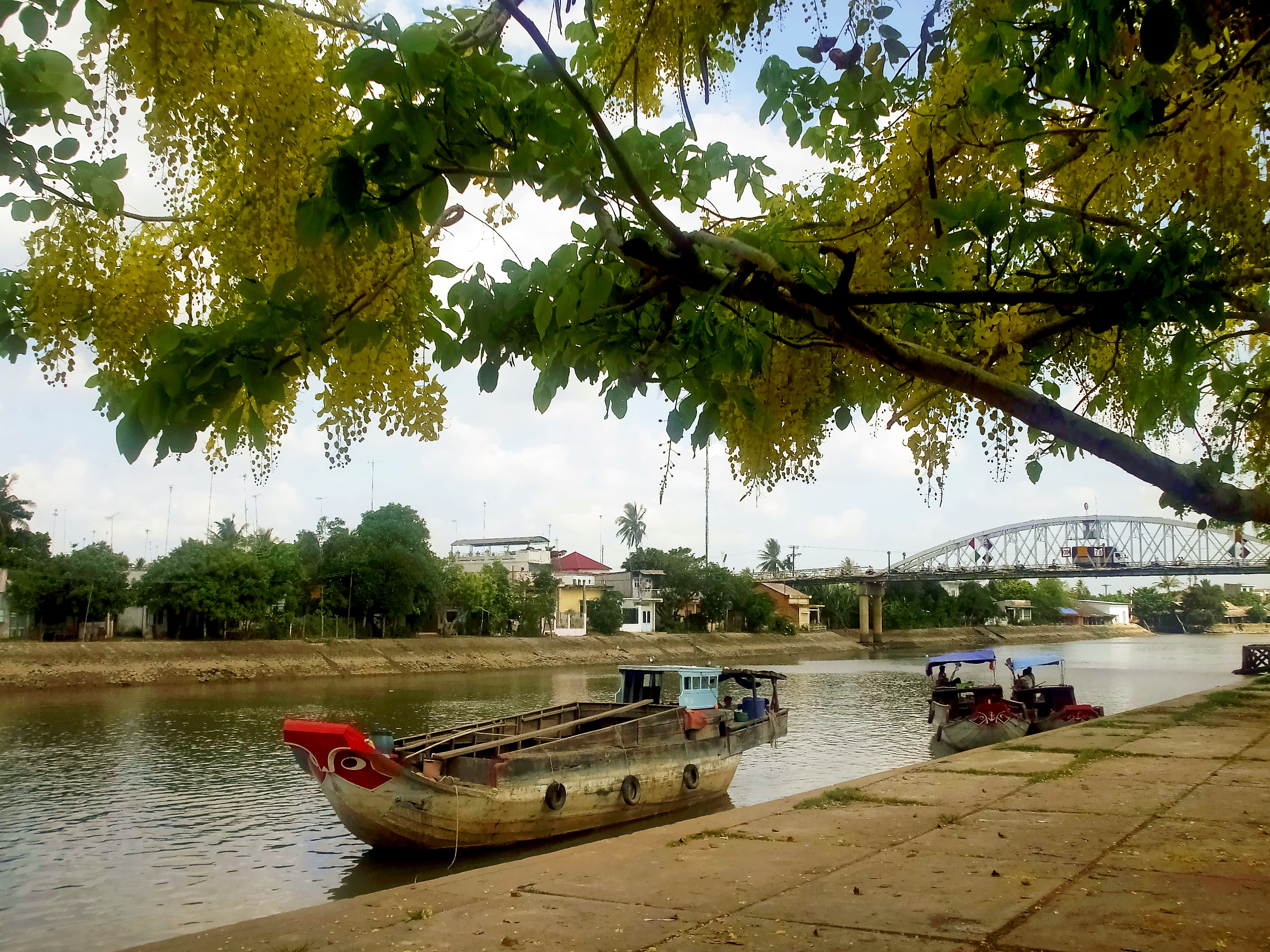 Kênh Chợ Lách (Bến Tre, Việt Nam), nối sông Cổ Chiên với sông Tiền. Đây là một tuyến đường thủy nội địa quan trọng của huyện.